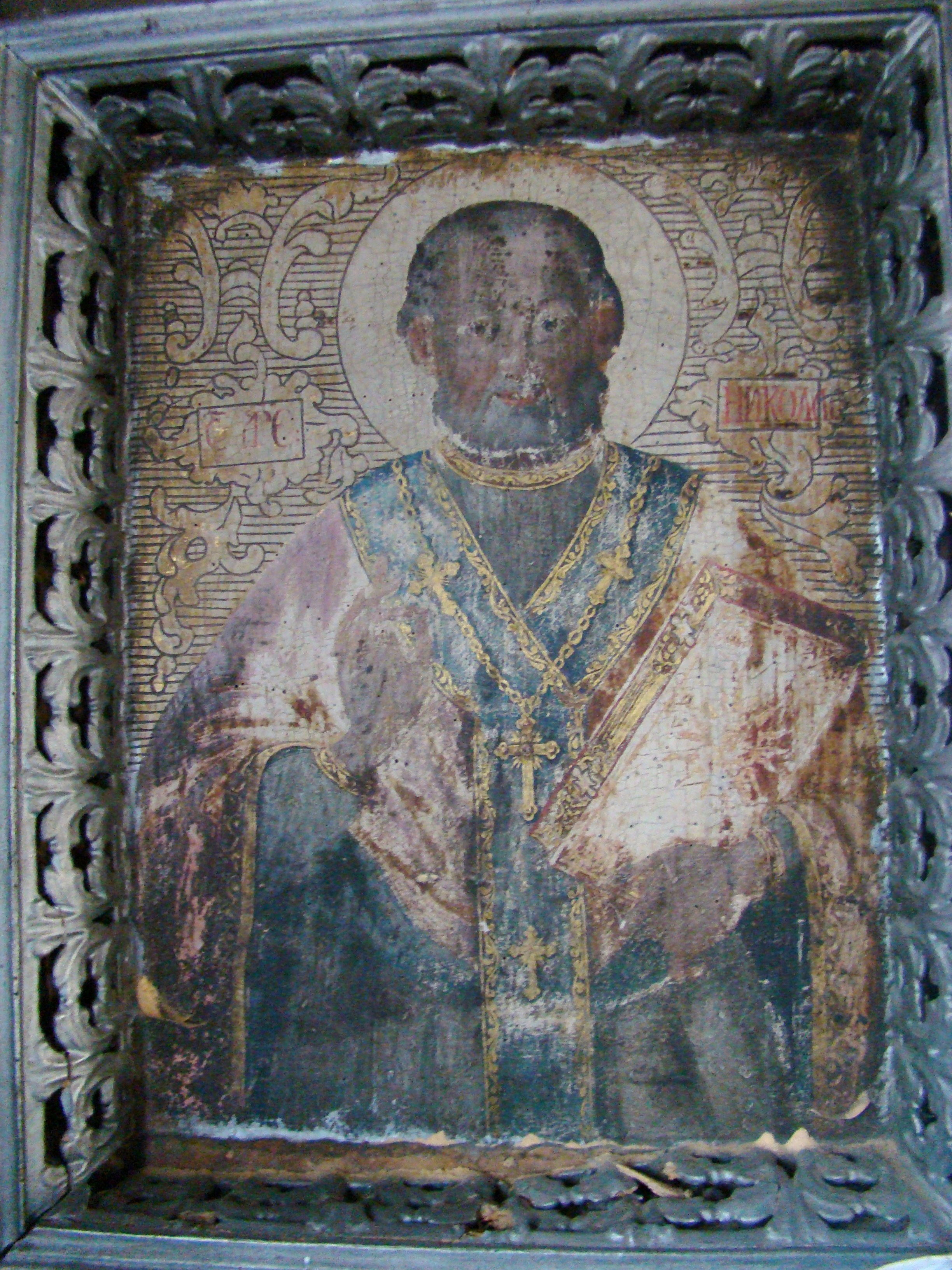 Biserica de lemn "Sfântul Nicolae", sat VALEA CHIOARULUI